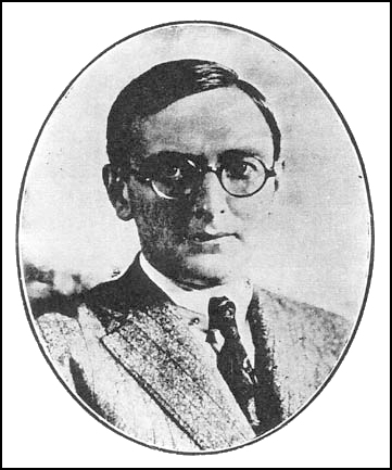 Renato Kehl, fundador da sociedade eugênica no Brasil, e seu divulgador mais entusiasta.